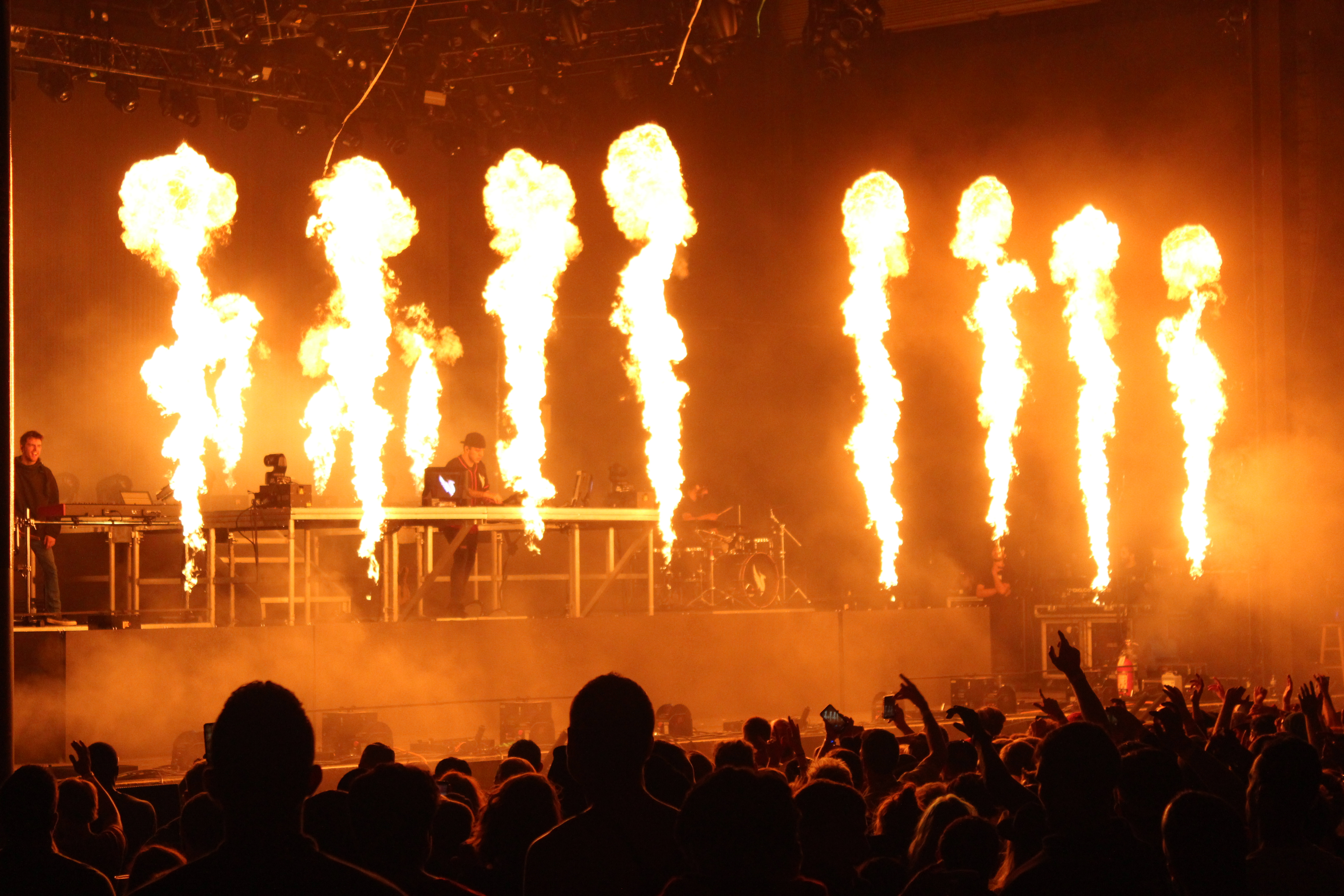 El productor de música electrònica Illenium en una de les seves actuacions del tour en suport del seu àlbum "Ascend" a la ciutat de Richmond, a l'estat de Virginia, als Estats Units. Es pot apreciar l'abundància de foc que normalment utilitza com a efecte visual durant els seus espectacles i, al fons, el productor juntament amb el seu logo, que consisteix en un ocell de perfil.